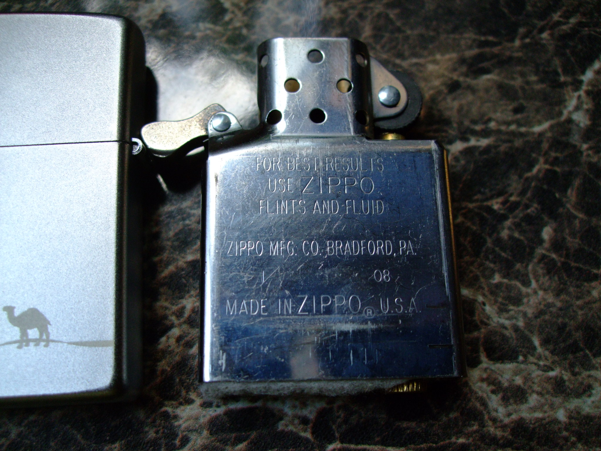 Wkład zapalniczki Zippo.